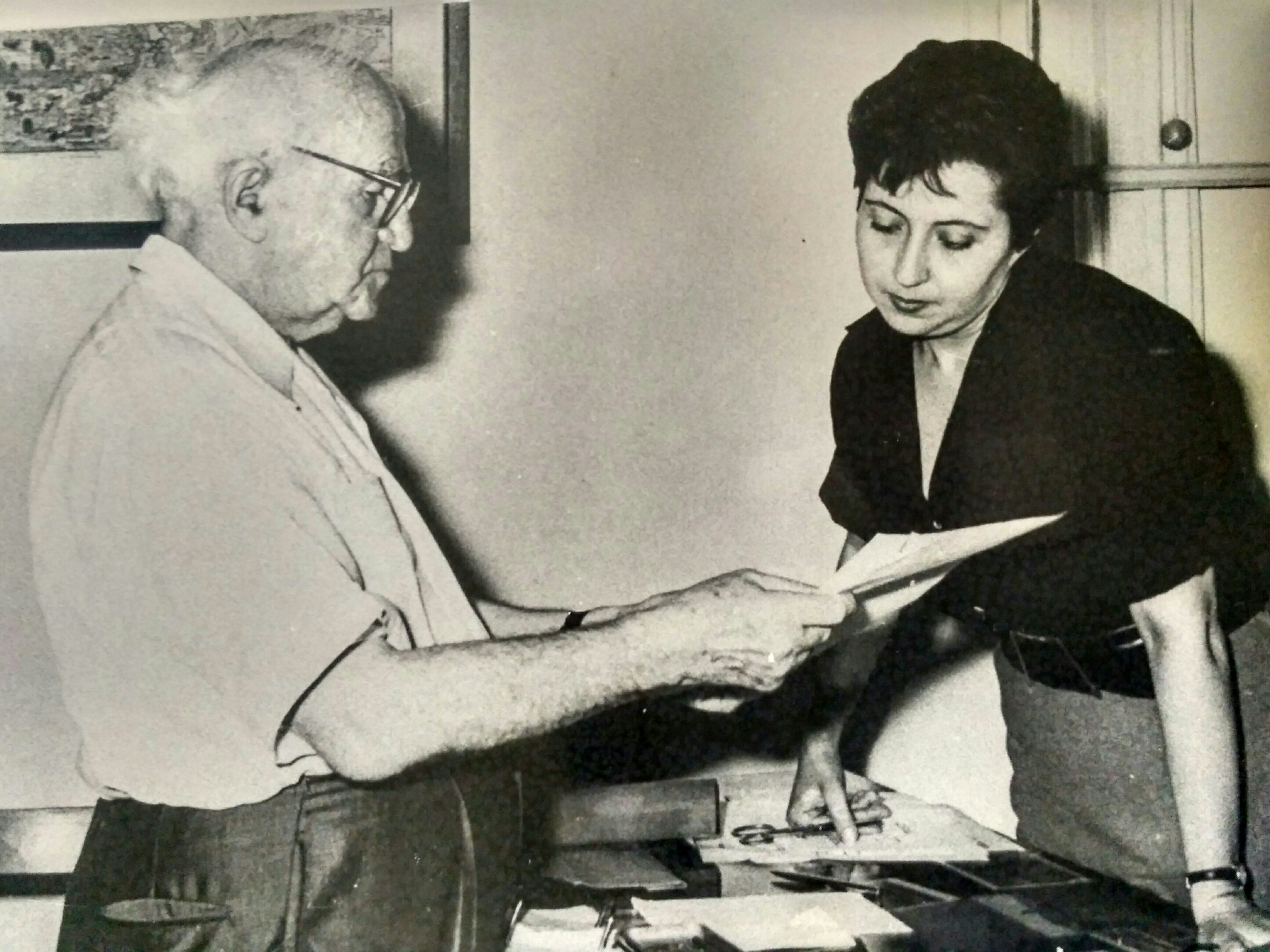 מלכה ליף בעבודה עם בן-גוריון